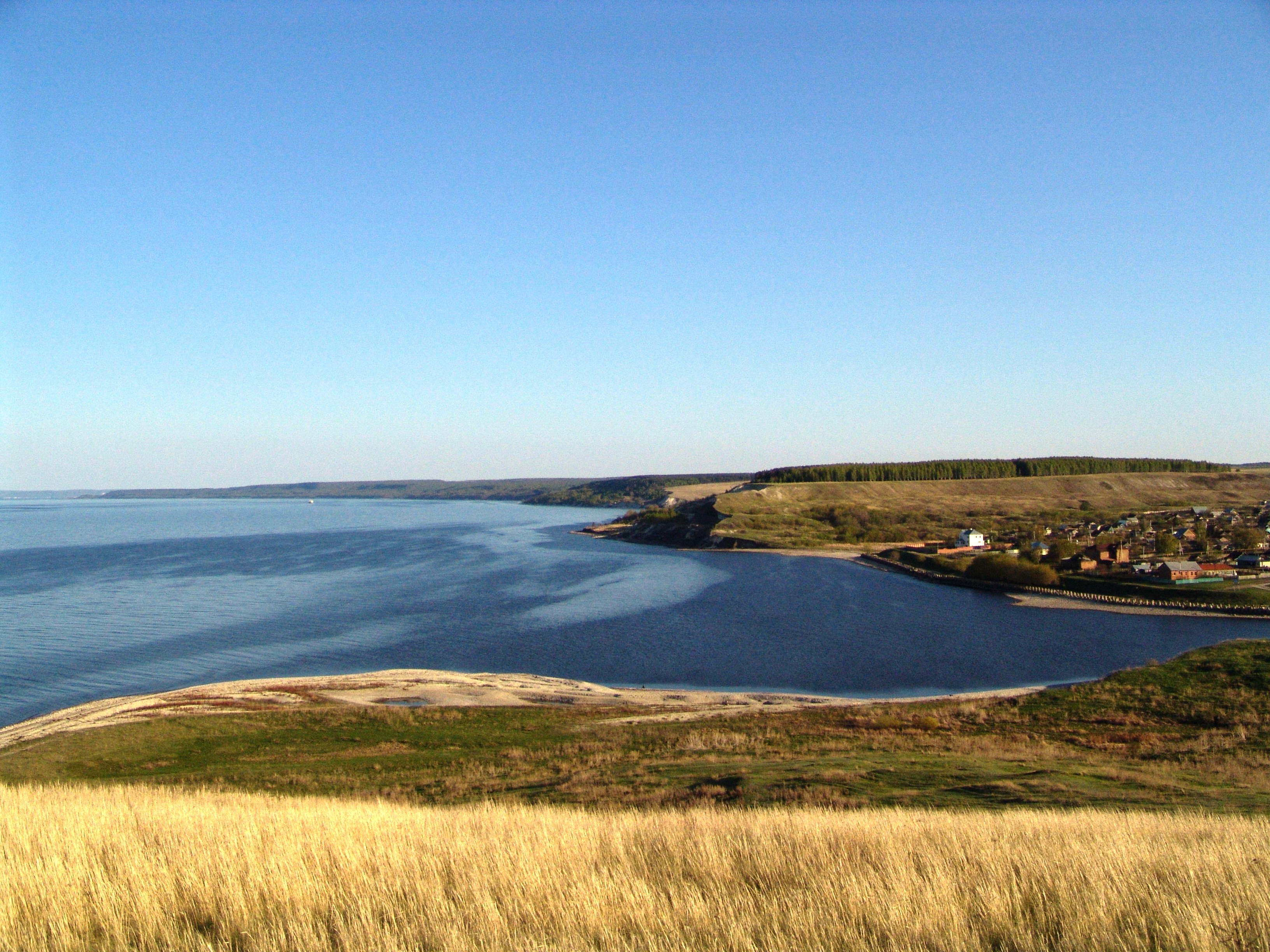 Село Новодевичье на Волге. Береговая часть.